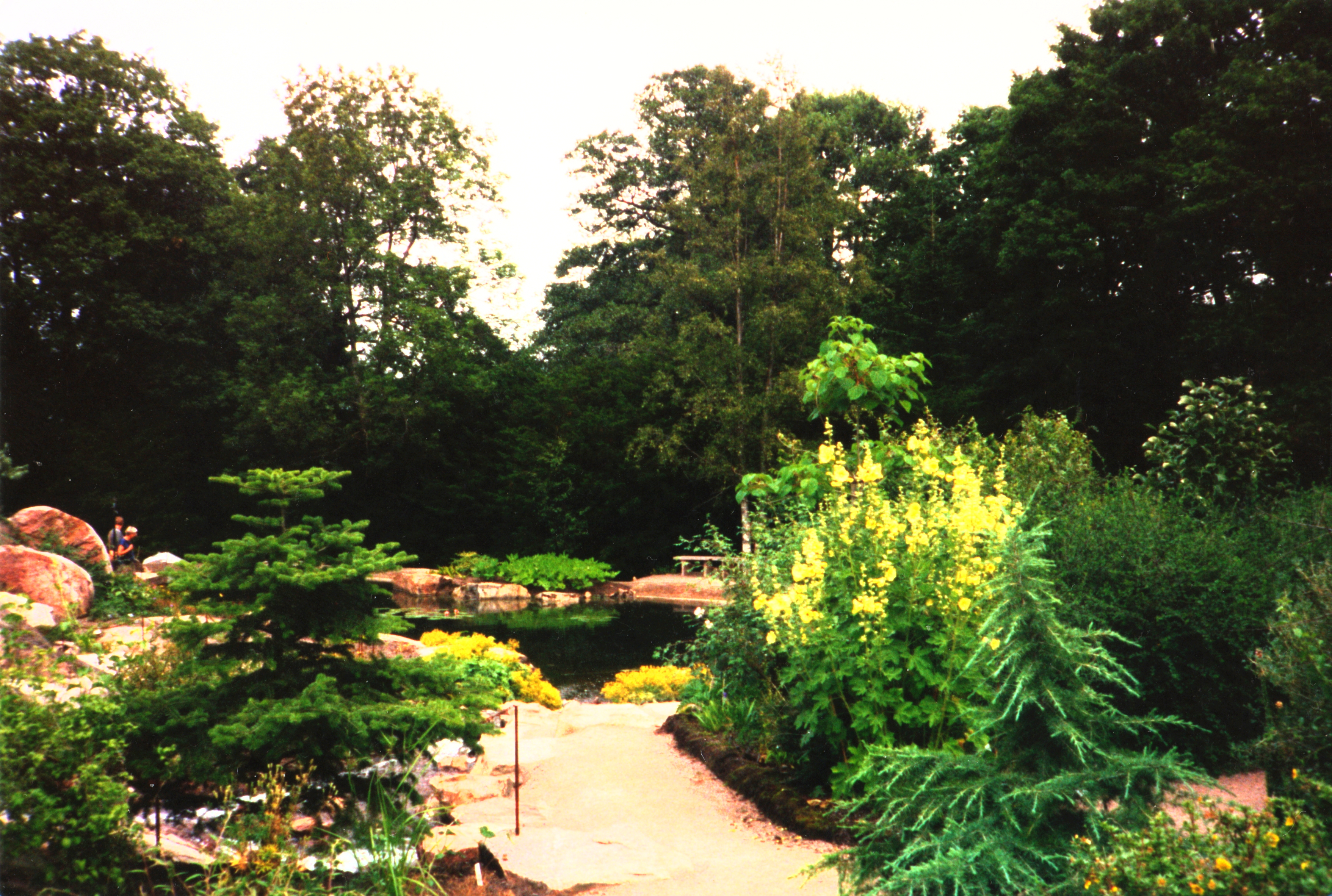 Botaniska trädgården i Göteborg (början på Japandalen, 2010)